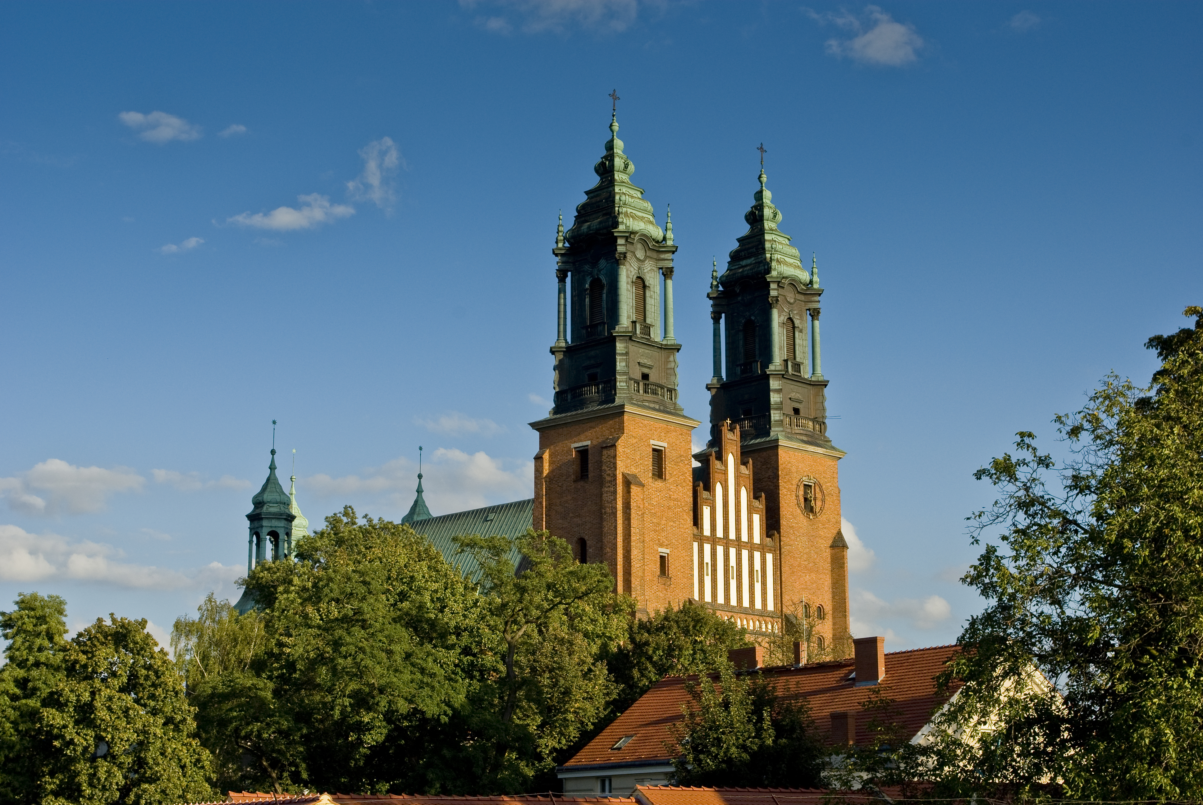 Poznań - Bazylika archikatedralna Świętych Apostołów Piotra i Pawła (zabytek nr A148)